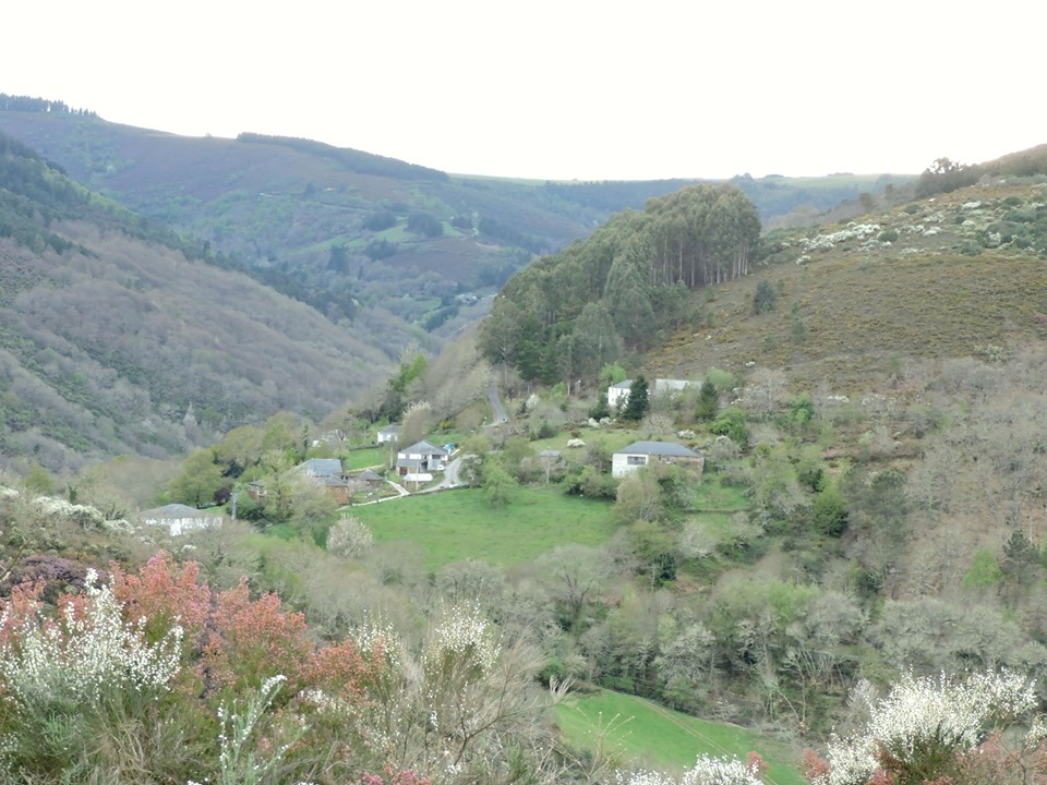 Lugar de Quintá de Cancelada. Concello de Becerreá